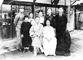 1941년, 한국의 독립운동가 죽산 조봉암의 가족들 (뒷줄 맨 오른쪽이 죽산 조봉암.)